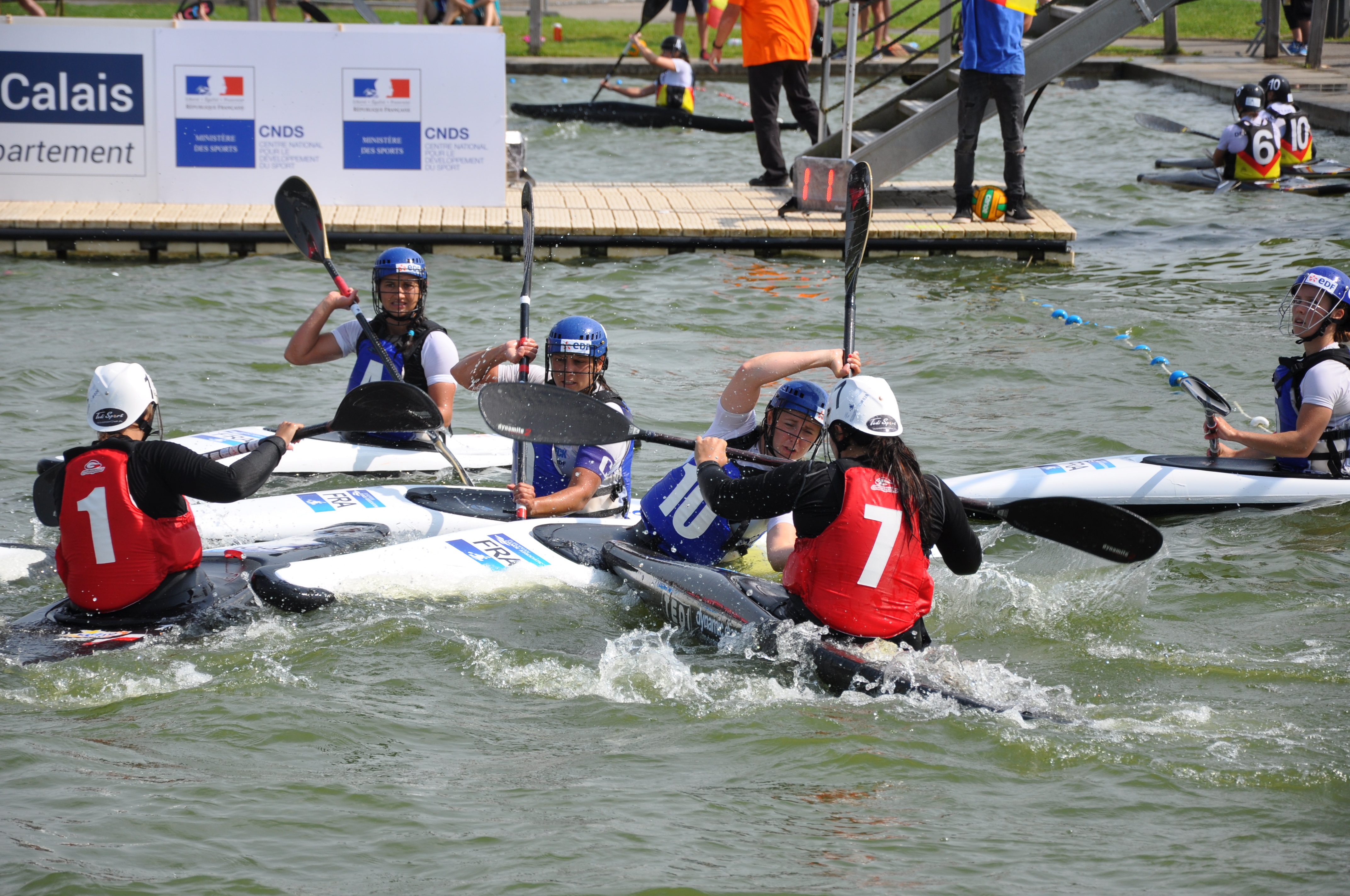 Match FRA-POL Women U21 Canoe Polo 2017